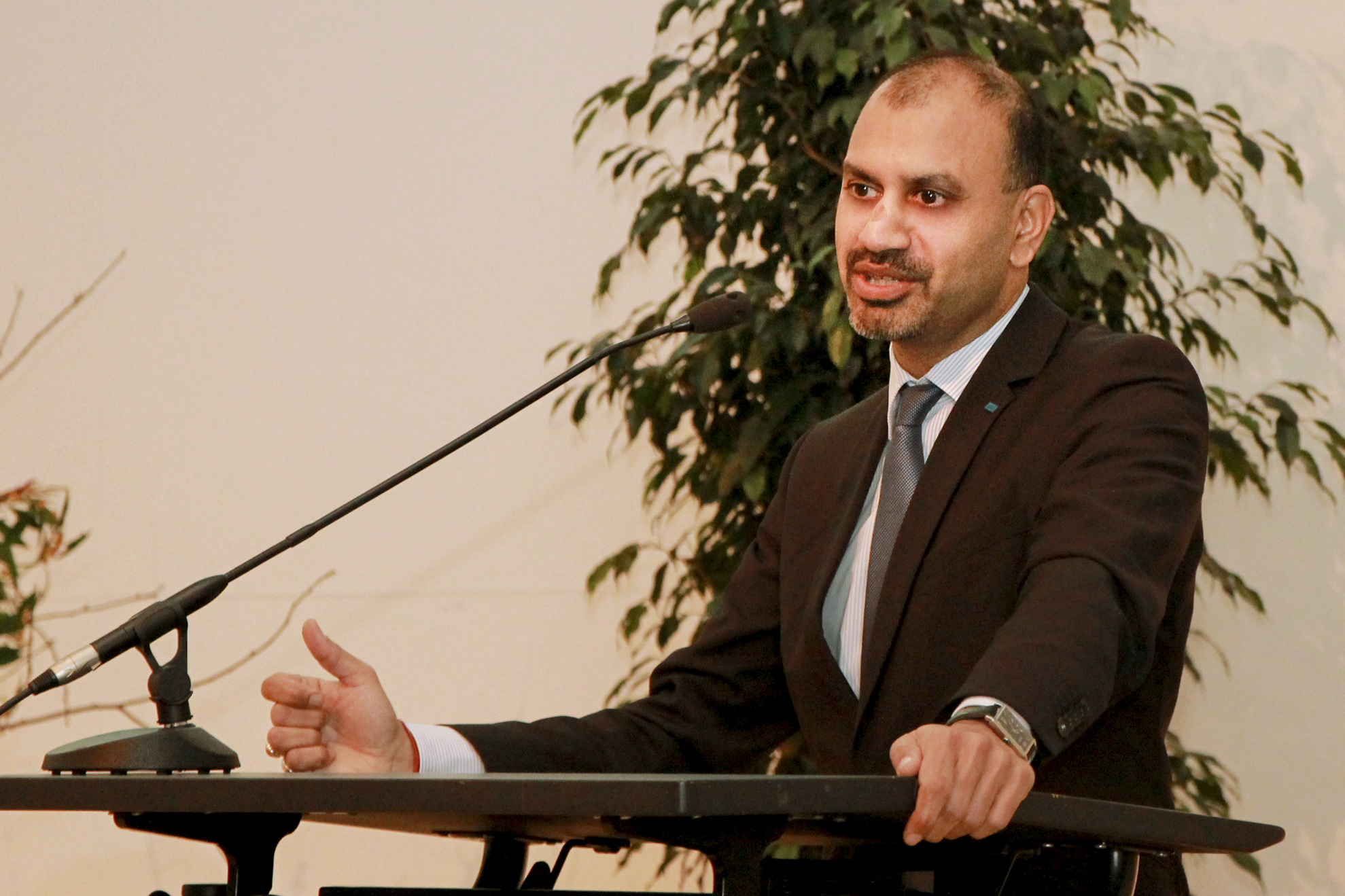 JLU-Präsident Prof. Dr. Joybrato Mukherjee (2016).